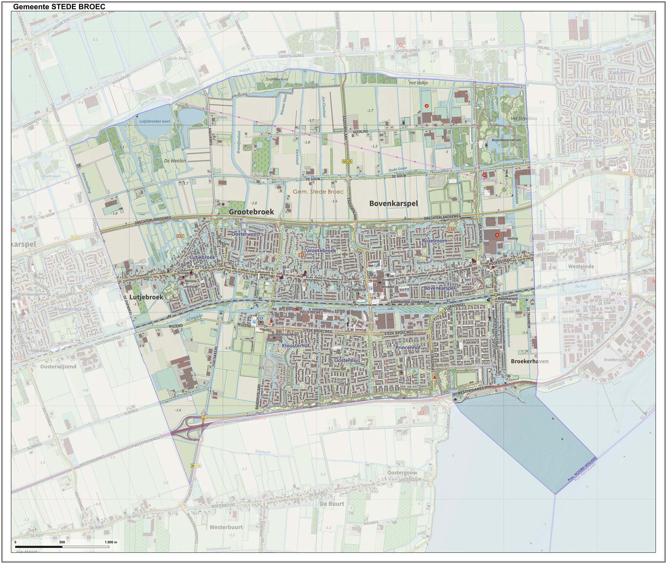 Topografische gemeentekaart. Resolutie: 400 pixels/km. Kaartbeeld samengesteld uit de open geodata van de Top10NL en Top25namen (Kadaster), Creative Commons-BY licentie. Gebouwvlakken uit open geodata BAG extract. Wegen uit de OpenStreetMap, OpenStreetMap community. Reliëfschaduw uit de Actuele Hoogtekaart AHN2. Samenstelling en kleurenschema: Jan-Willem van Aalst, met QGIS. Zie ook de Legenda.